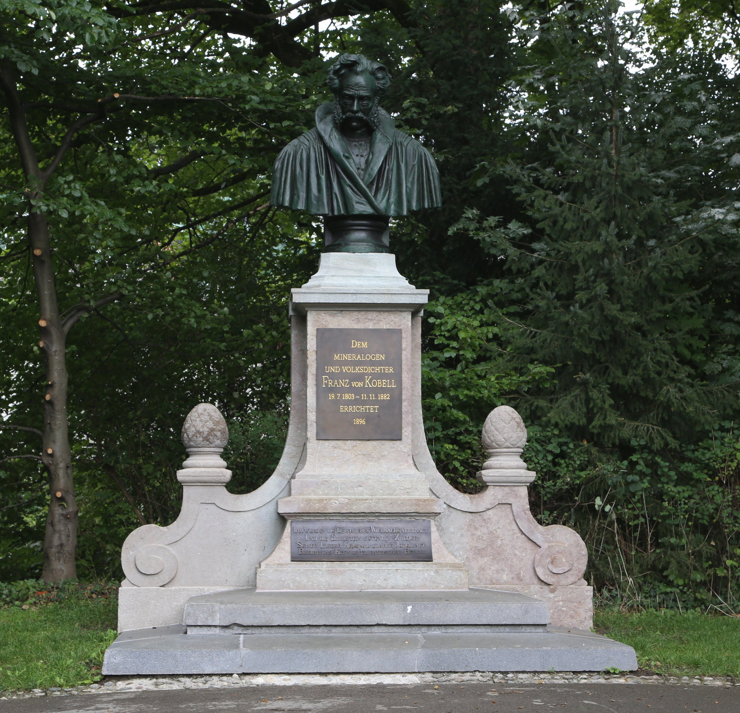 Franz-von-Kobell-Denkmal mit Bronzebüste, 1896 von Benedikt Koenig in München-Haidhausen (Maximiliansanlagen), München